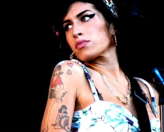 Amy Winehouse retratada en xullo de 2008